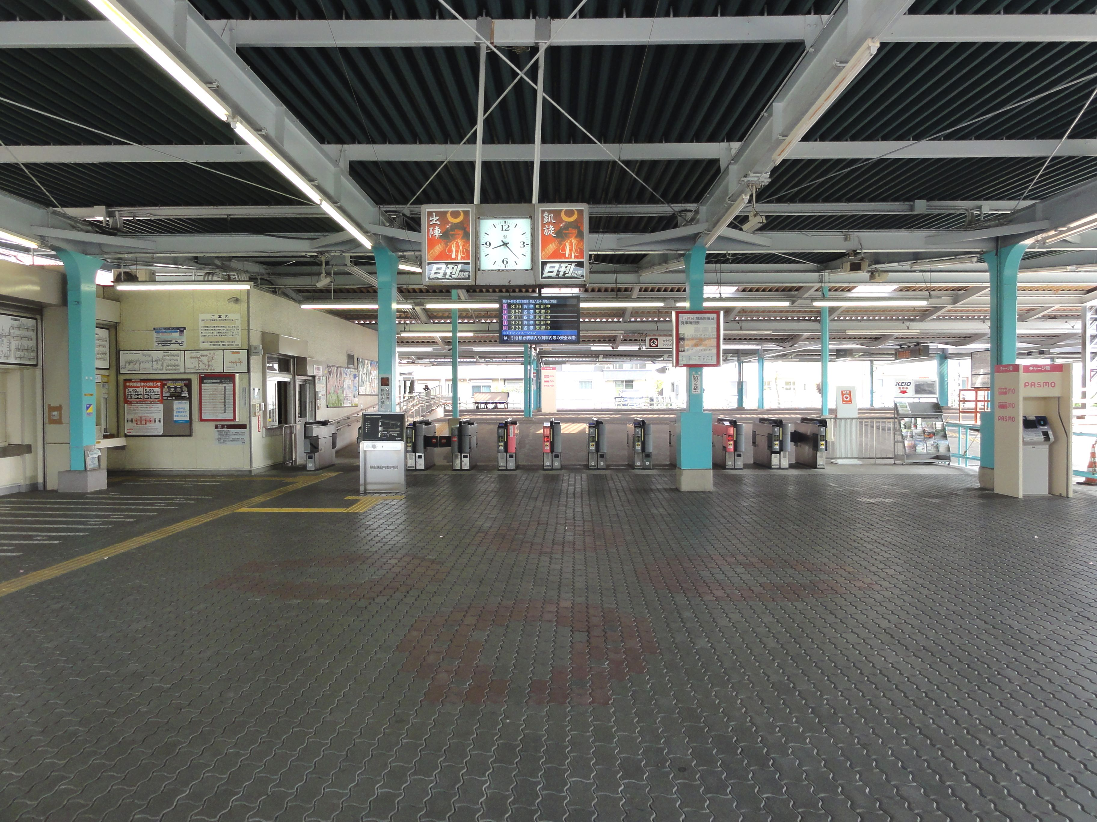 府中競馬正門前駅改札口